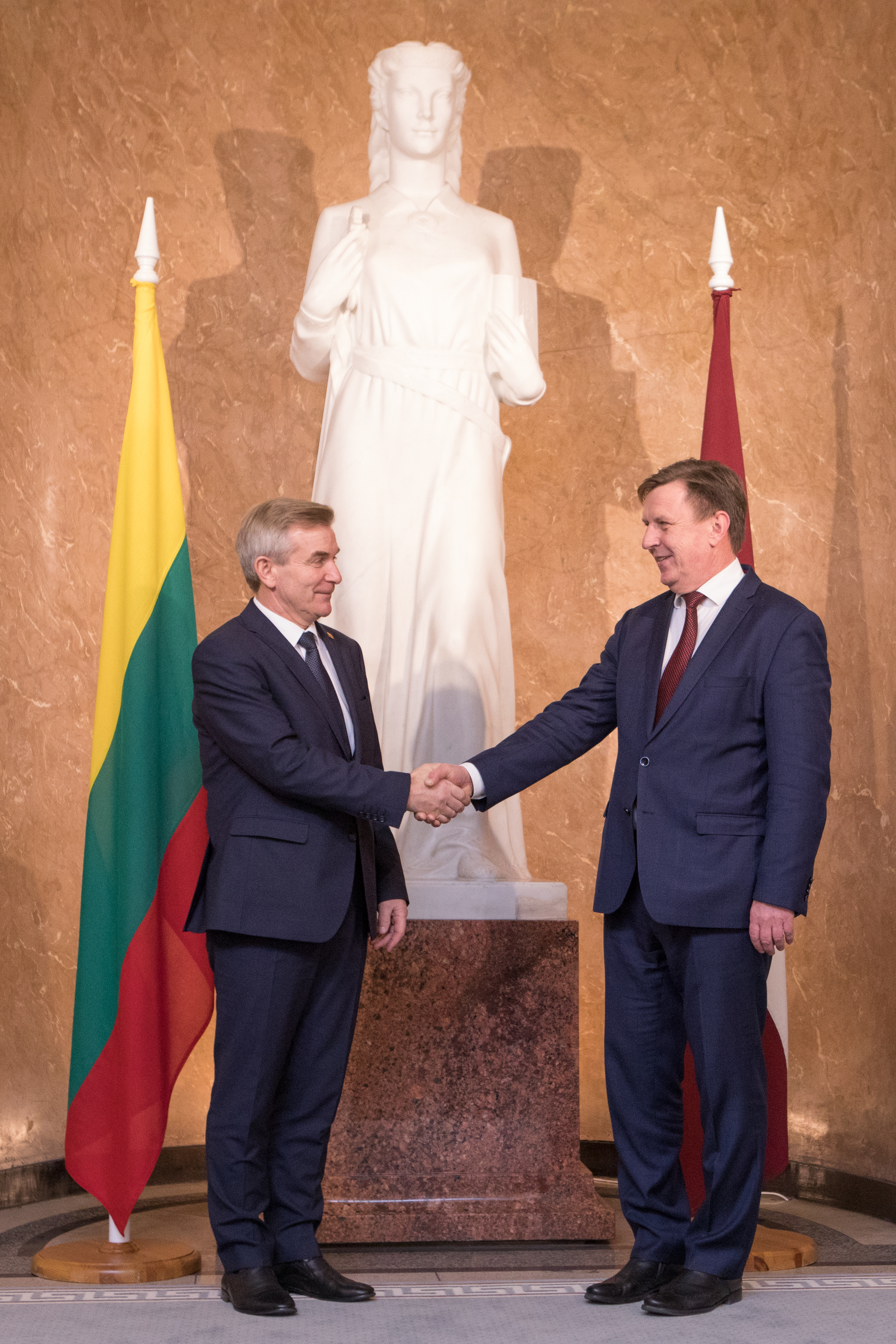 2016.gada 6.decembris. Lietuvas parlamenta priekšsēdētājs Viktors Pranckietis (Viktoras Pranckietis) tiekas ar premjerministru Māri Kučinski. Foto: Ernests Dinka, Saeimas Administrācija Izmantošanas noteikumi: saeima.lv/lv/autortiesibas